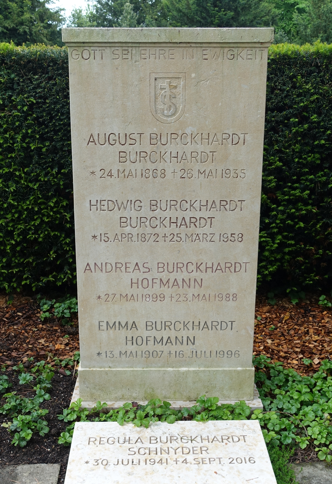 August Burckhardt-Burckhardt (1868-1935) Dr.phil. Historiker, Familiengrab auf dem Friedhof am Hörnli